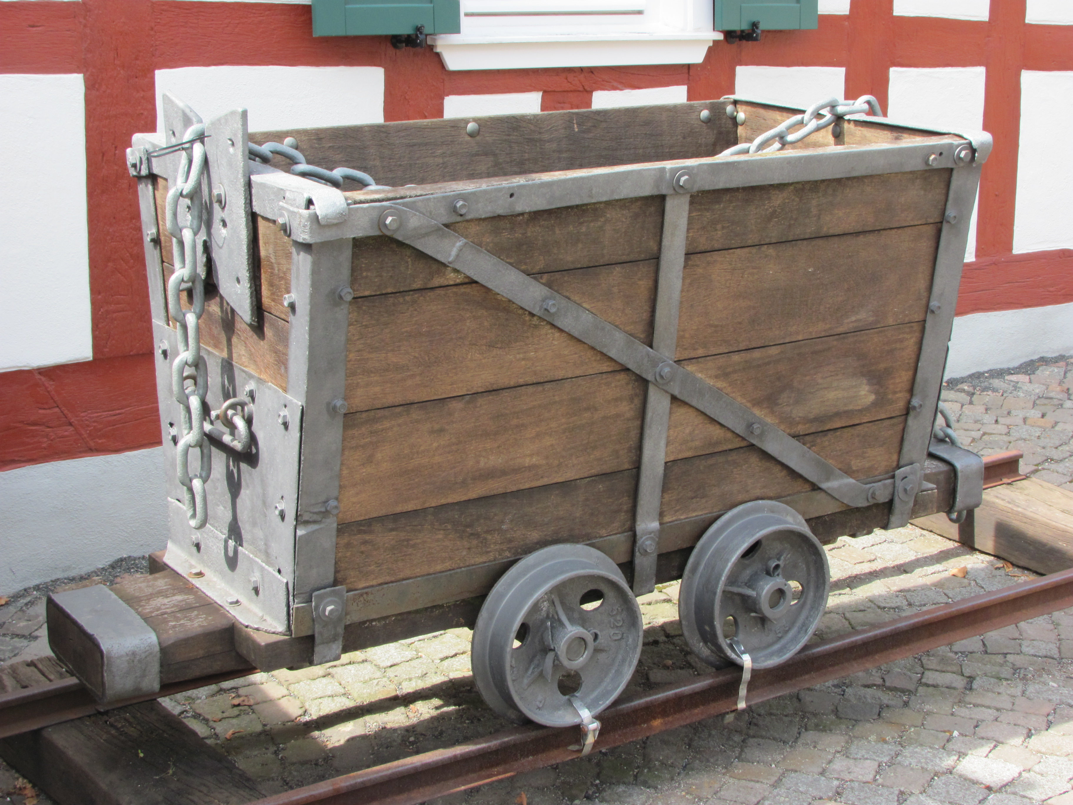 Grubenhunt der Kettenbahn des ehemaligen Ölschieferbergwerks Messel. Eichenholz und Stahl. Fassungsvermögen: 0,5 Kubikmeter. Diese Fahrzeuge waren unverändert 1884-1960 im Einsatz